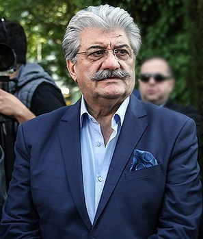 بهرام حصیری در مراسم تشییع پیکر ناصر چشم آذر ۱۶ اردیبهشت ۱۳۹۷ تالار وحدت تهران